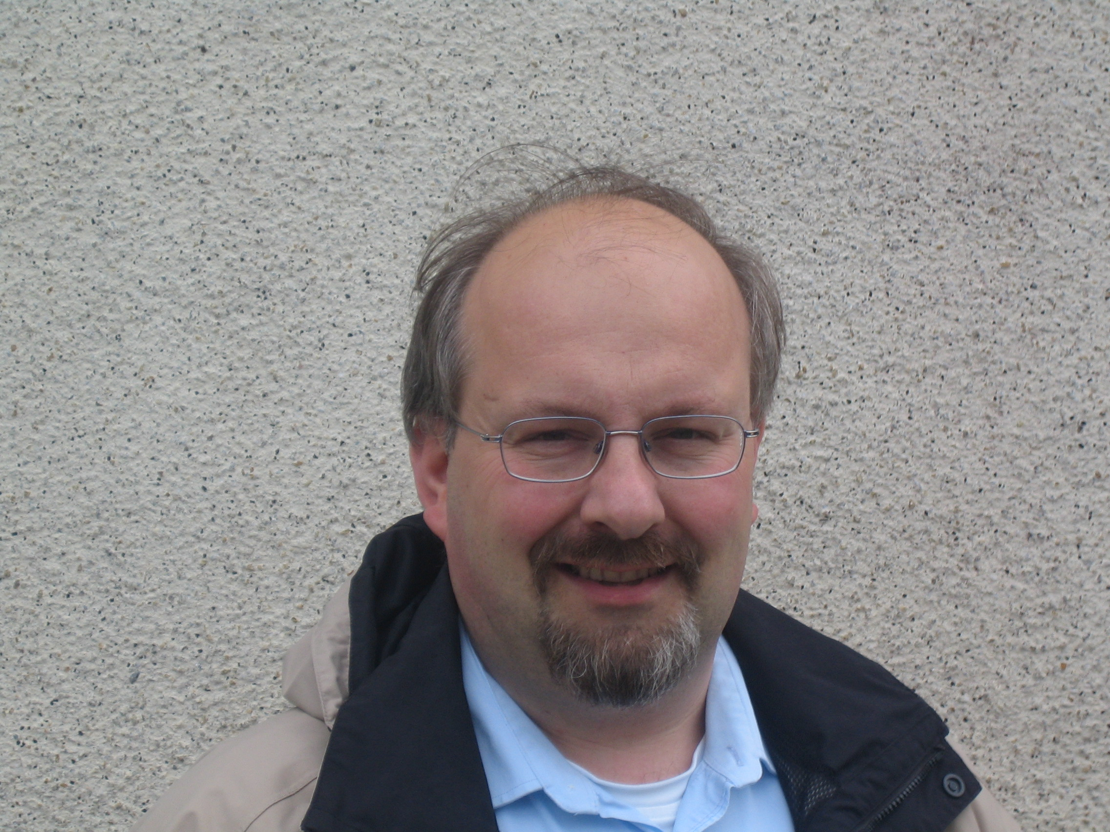 Claudius Moseler, Generalsekretär der ödp seit 2001, Mitglied des Mainzer Stadtrats seit 2004